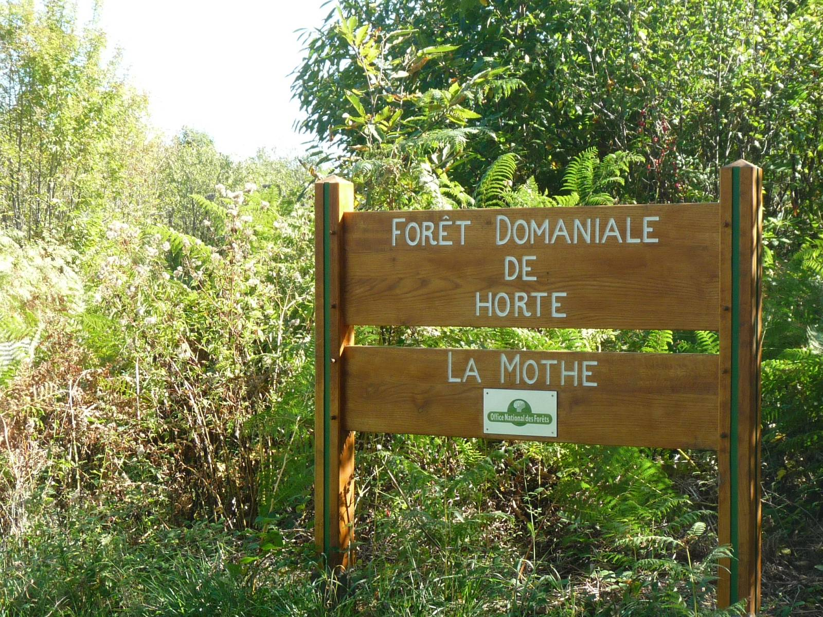 forêt d'Horte en sortant de Charras, Combiers (16), France